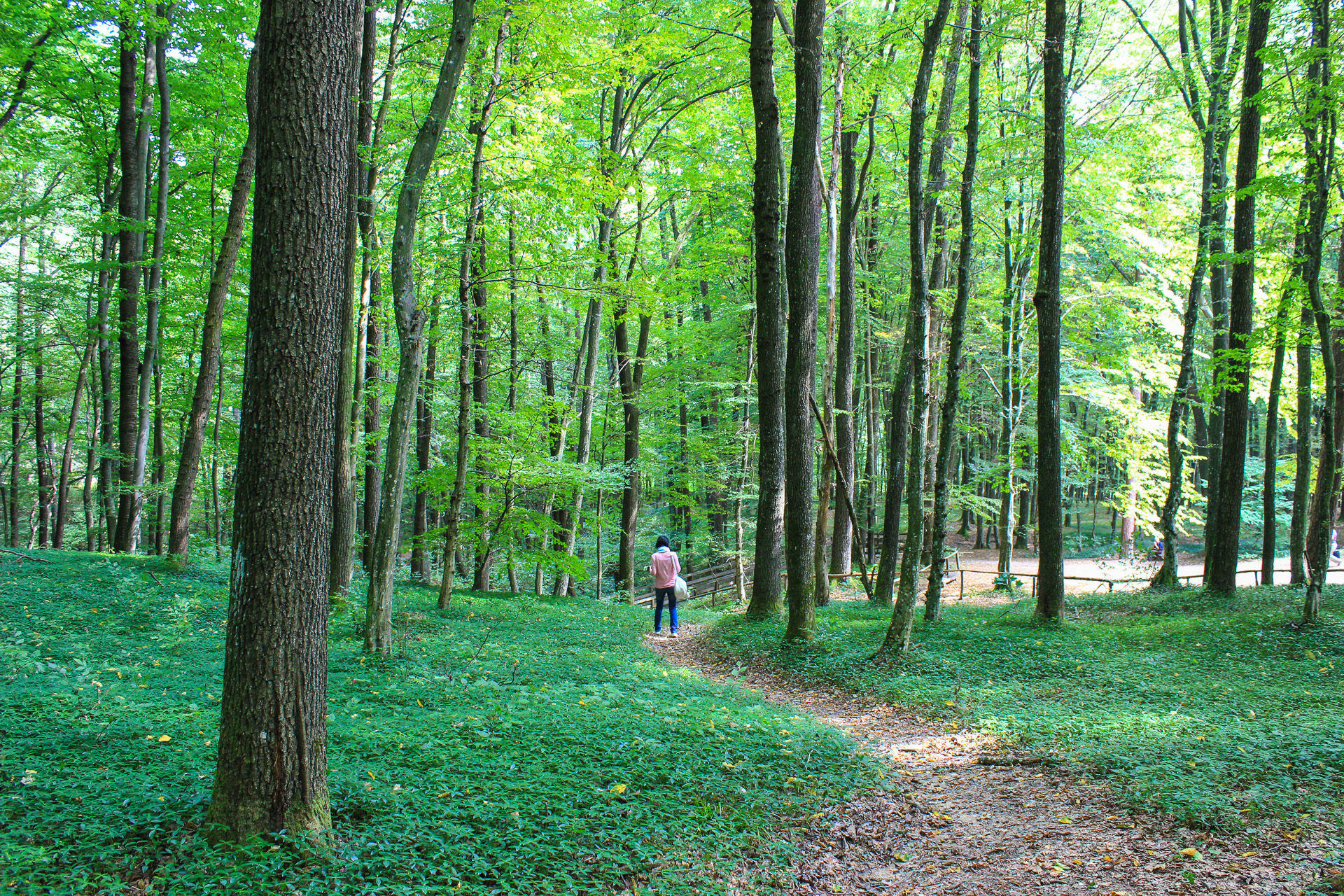 Bukovniško jezero